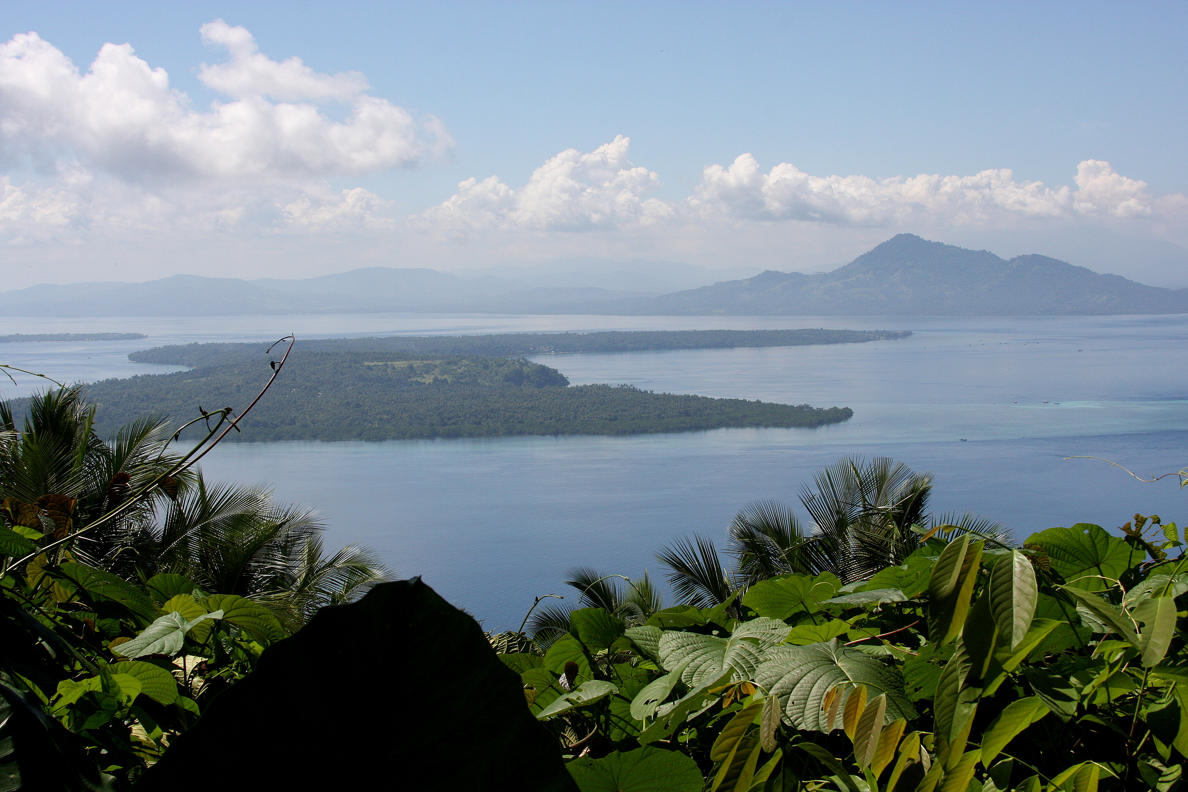 L'île de Bunaken vue de l'île de Manado Tua